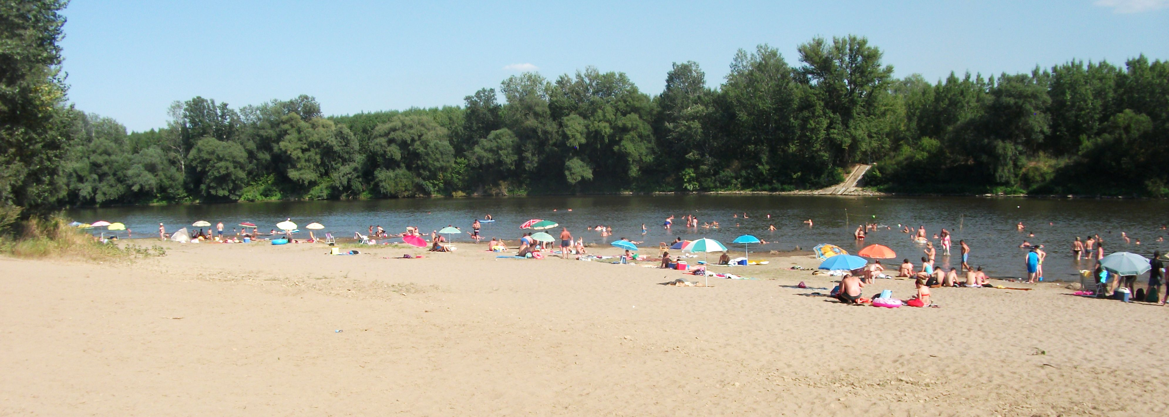 Cigánd,Tiszapart - a város mellett a Tisza homokos partja kedvelt, veszélytelen fürdőzőhely.